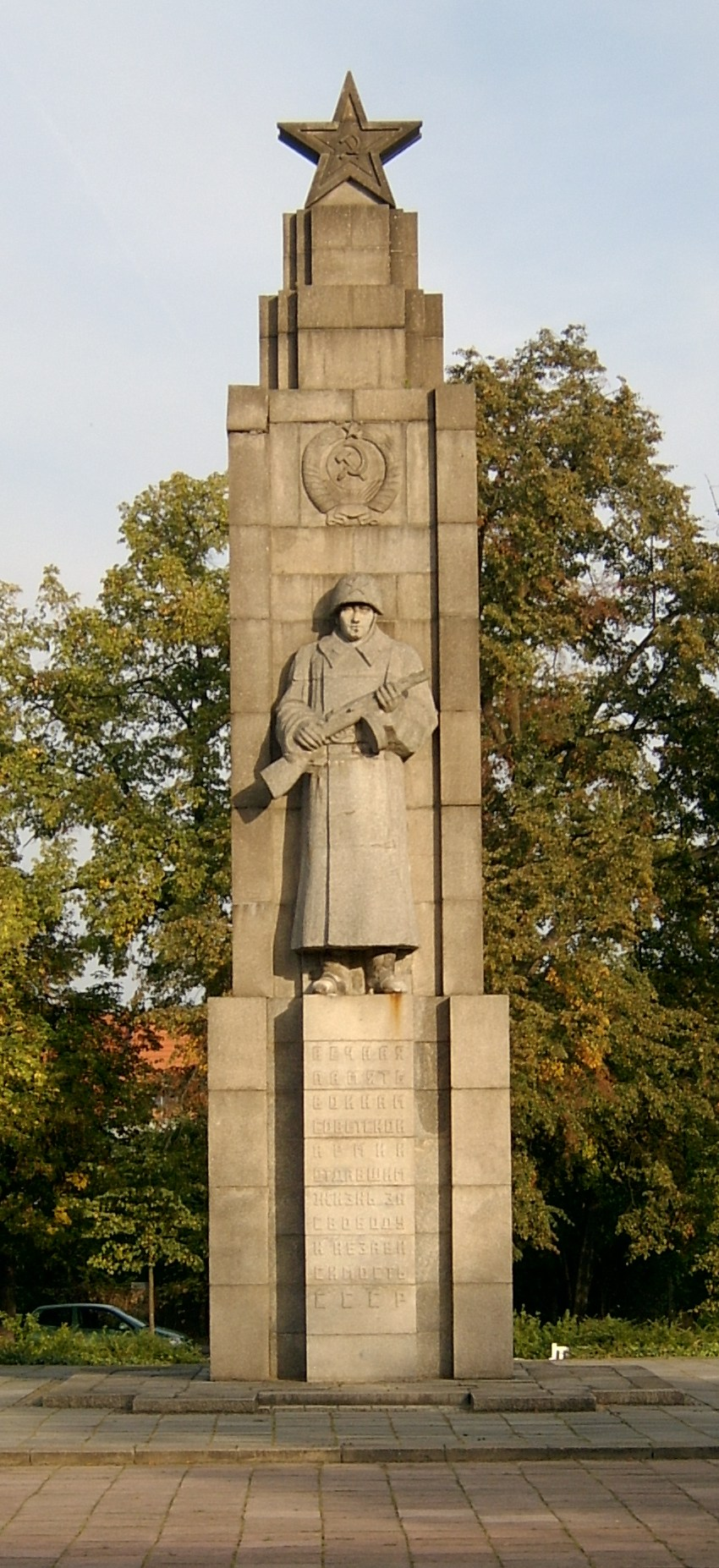 Mahnmal in Frankfurt (Oder) für gefallene sowjetische Soldaten im Zweiten Weltkrieg